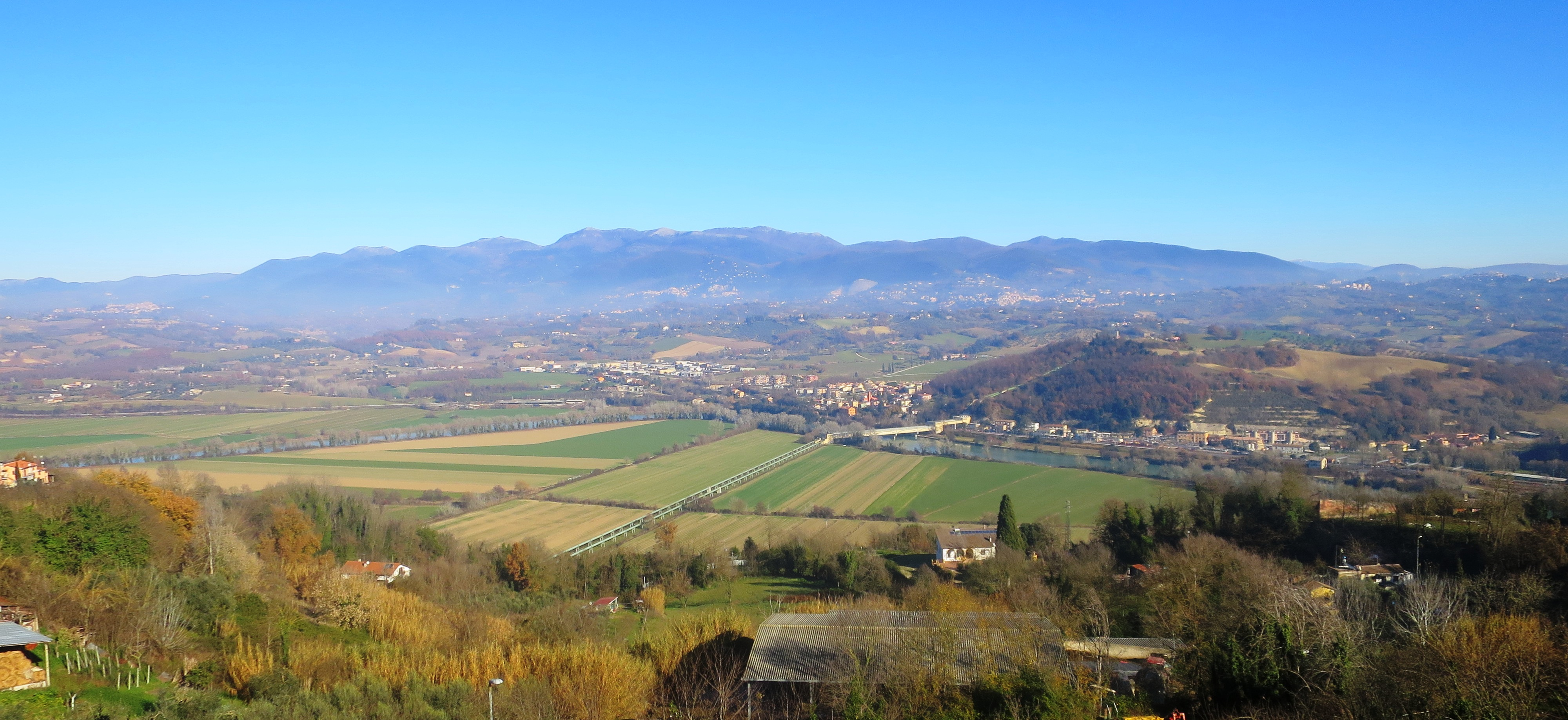 Vista verso est da Torrita Tiberina, Lazio